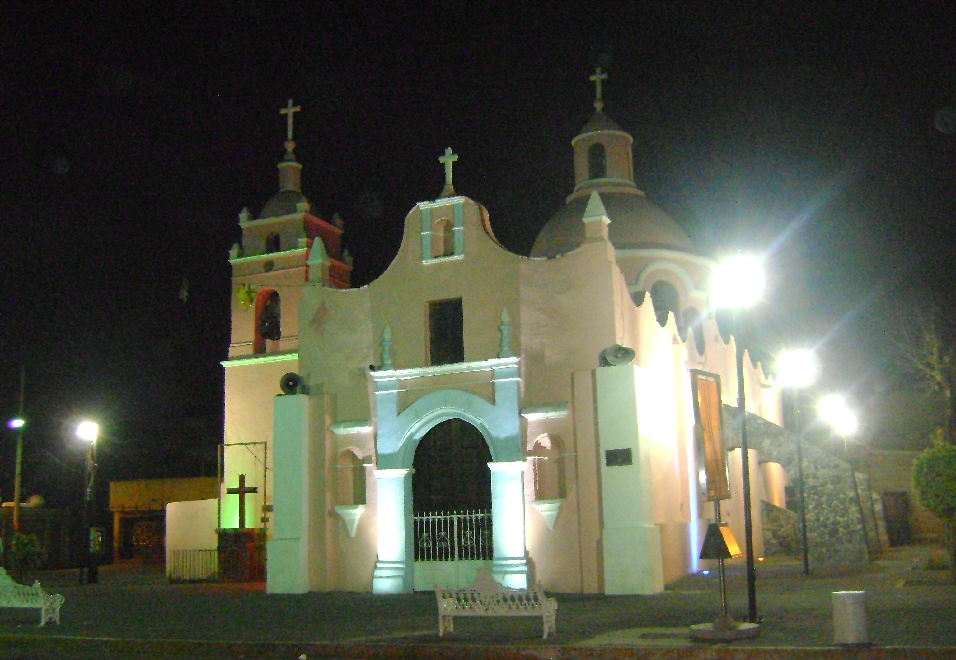 Capilla del Barrio San Juan Tlalteuhchi en Xochimilco.